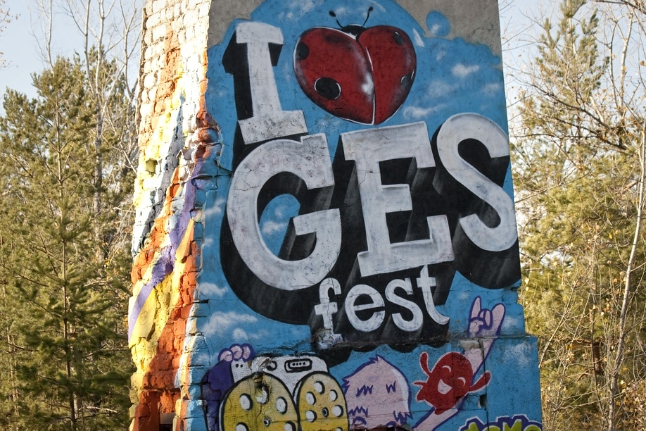 Граффити на бетонной конструкции, посвящённая фестивалю ГЭС